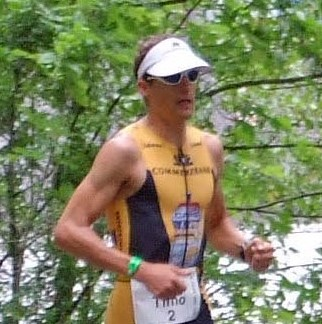 Timo Bracht beim abschließenden Marathonlauf während des Ironman 2007 in Ffm